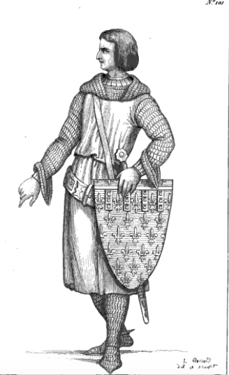 Philip of Artois